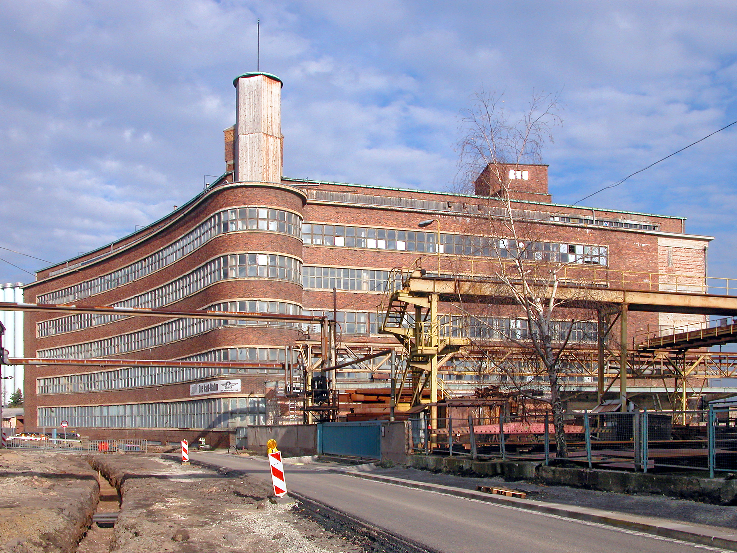 18.11.2006 01159 Dresden-Südvorstadt West, Fabrikstraße 13 (GMP: 51.038374,13.708425): Ehemaliger Fleischverarbeitungsbetrieb der Konsumgenossenschaft "Vorwärts",1927-1939 erbaut nach Plänen des Architekten Kurt Bärbig im Stil der Neuen Sachlichkeit. Leerstand seit 1991. [DSCN20005.TIF]20061118015DR.JPG(c)Blobelt